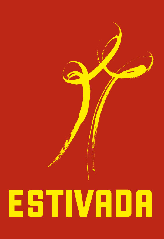 logo de l'Estivada Rodez